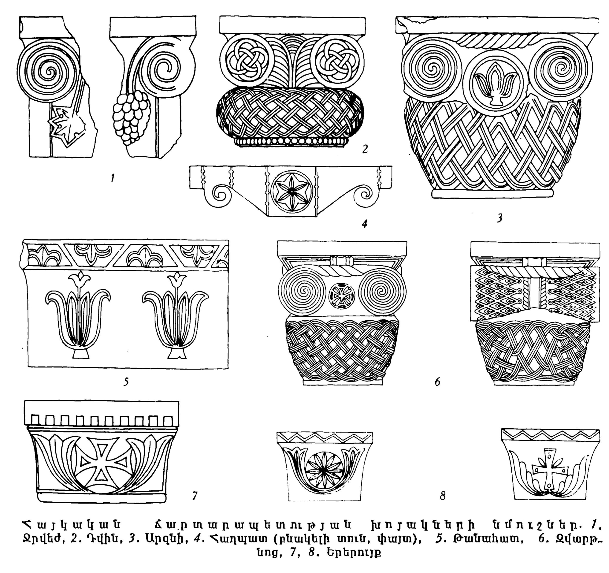 Հայկական ճարտարապետության խոյակներ